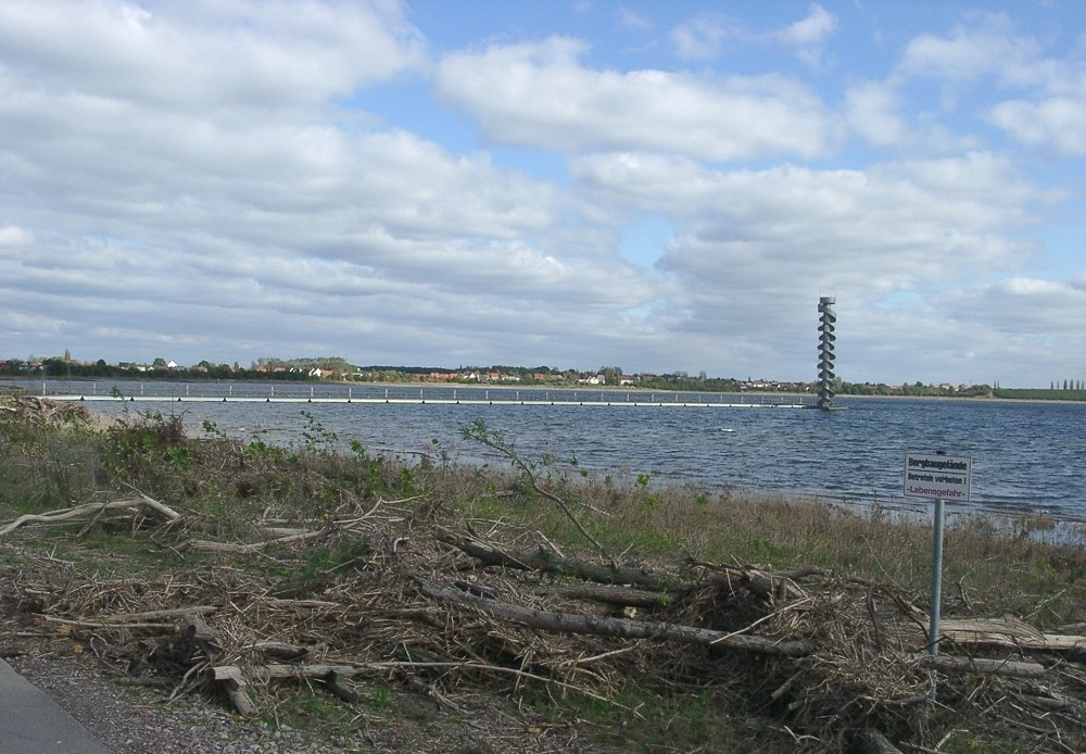 Goitschesee mit Pegelturm